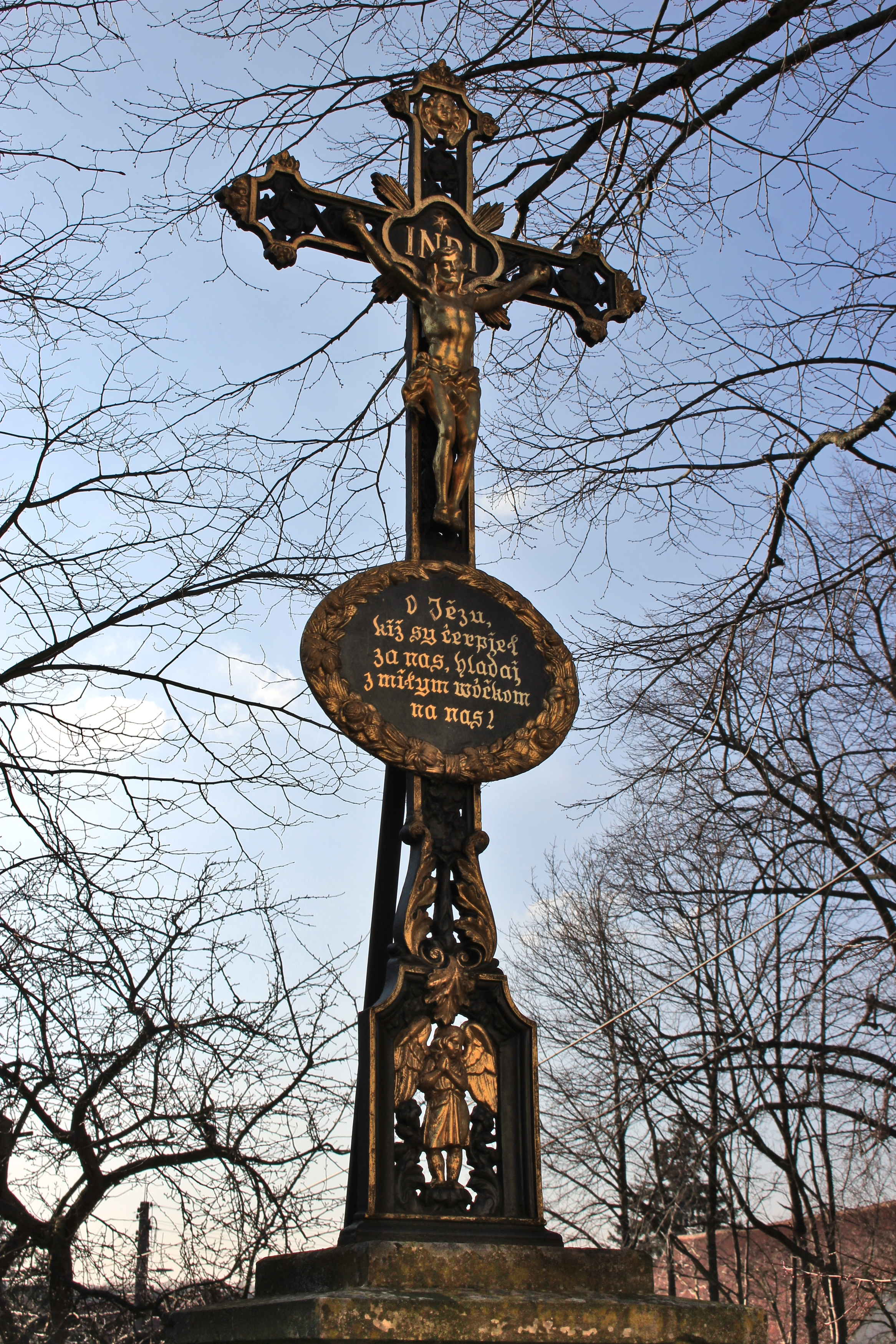 Hornjoserbsce: Swjaty křiž w Koslowje, před čo. 17 (kulturny pomnik)